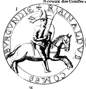 Renaud I. Burgundský